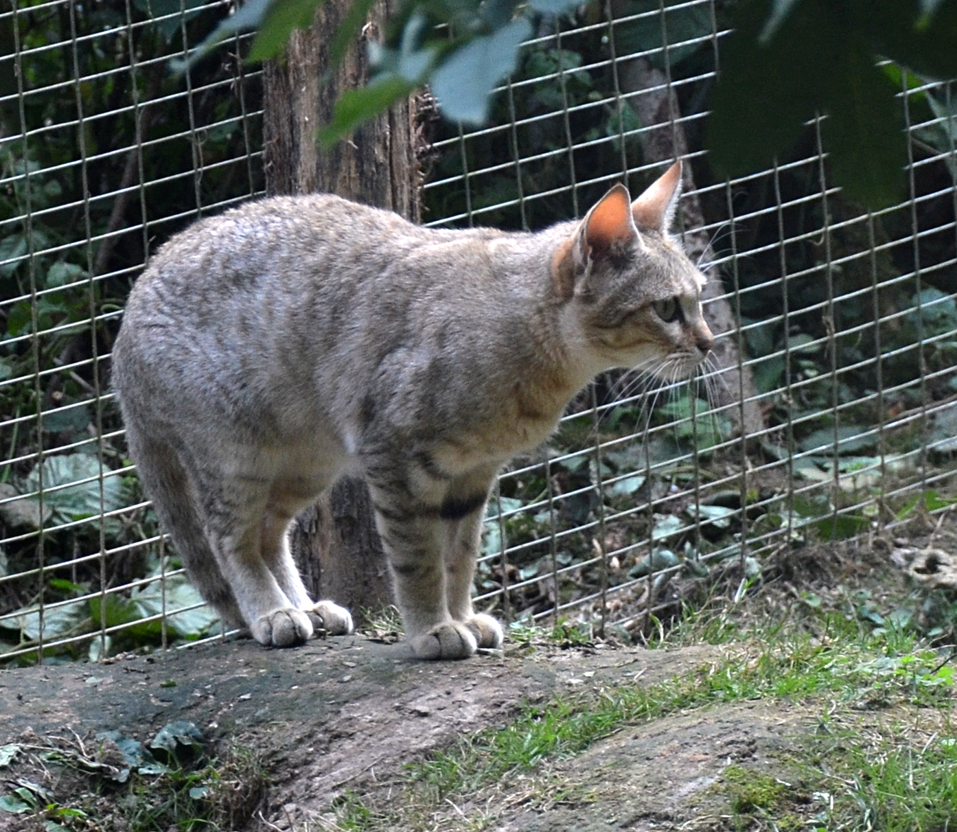 Chat de Gordoni (Felis silvestris gordoni) au Parc des Félins (Lumigny-Nesles-Ormeaux, 77, France).